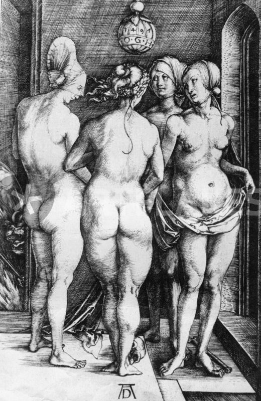 Vier nackte Frauen (Vier Hexen), 1497, Kupferstich